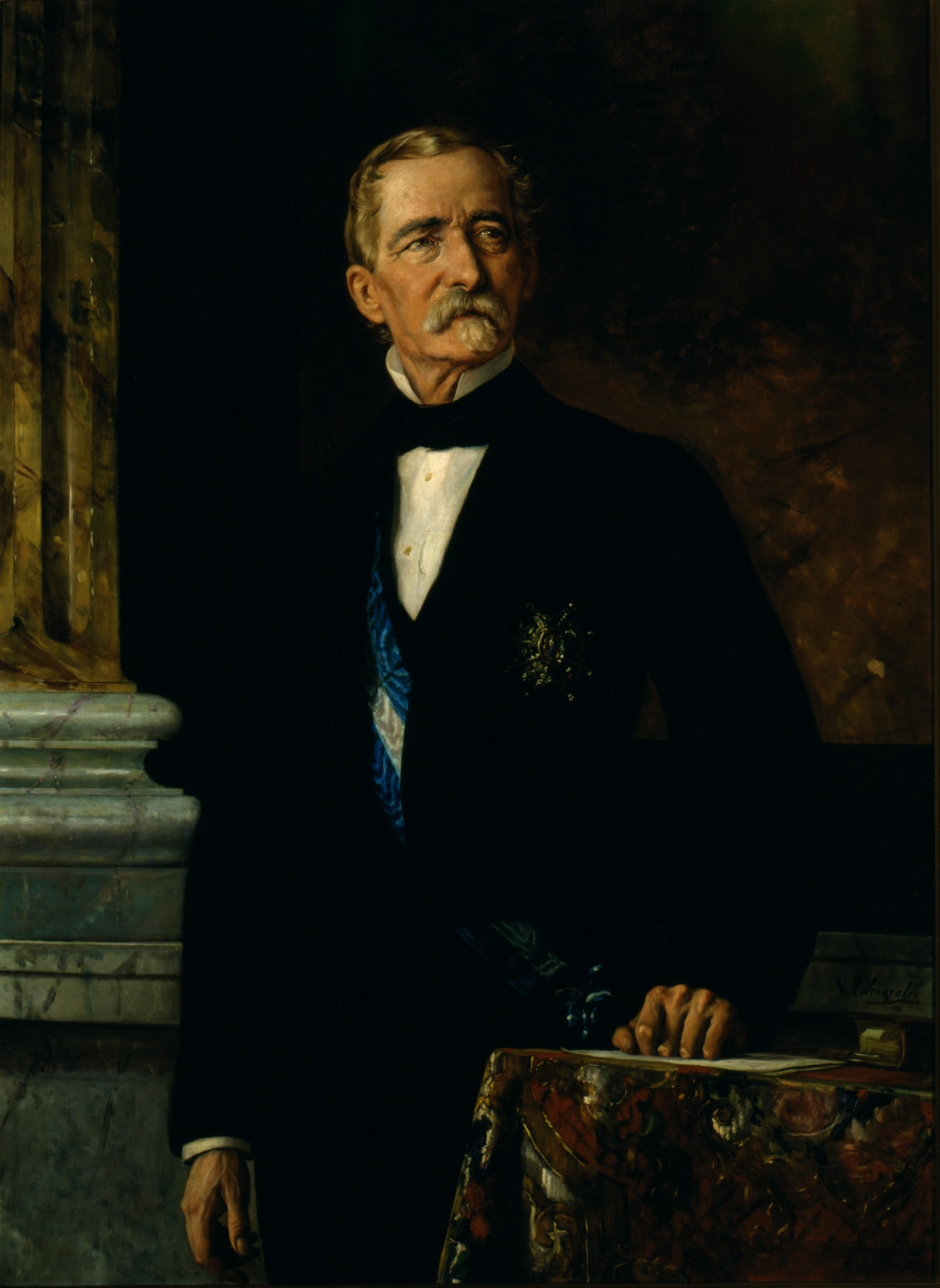 Retrato del político y aristócrata español Luis Mayans y Enríquez de Navarra (1805-1880), que llegó a ser presidente del Consejo de Ministros durante el reinado de Isabel II de España.